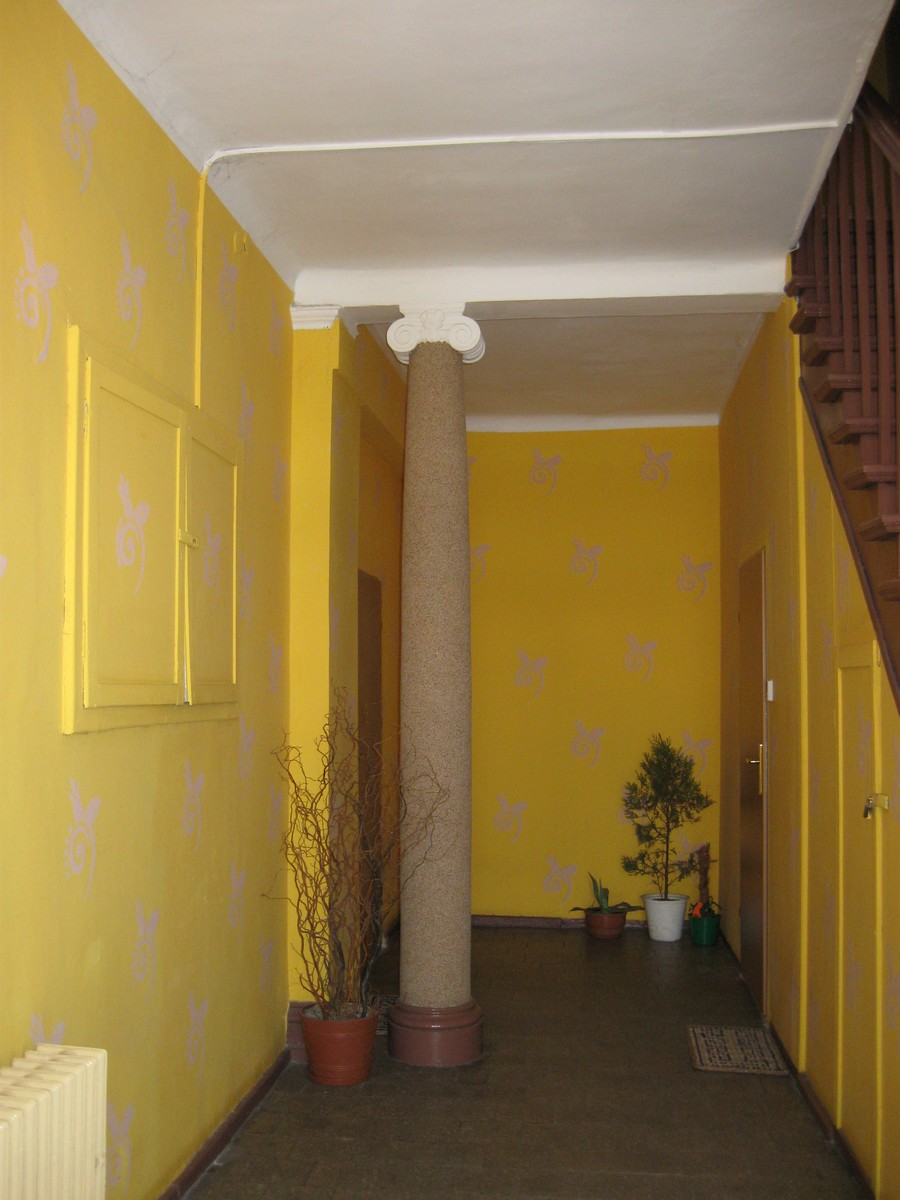 Pałac w Krotoszynie